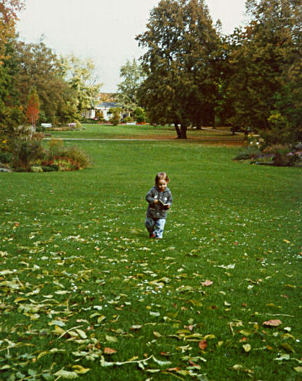 edited version of BadDuerkheimKurpark.jpg